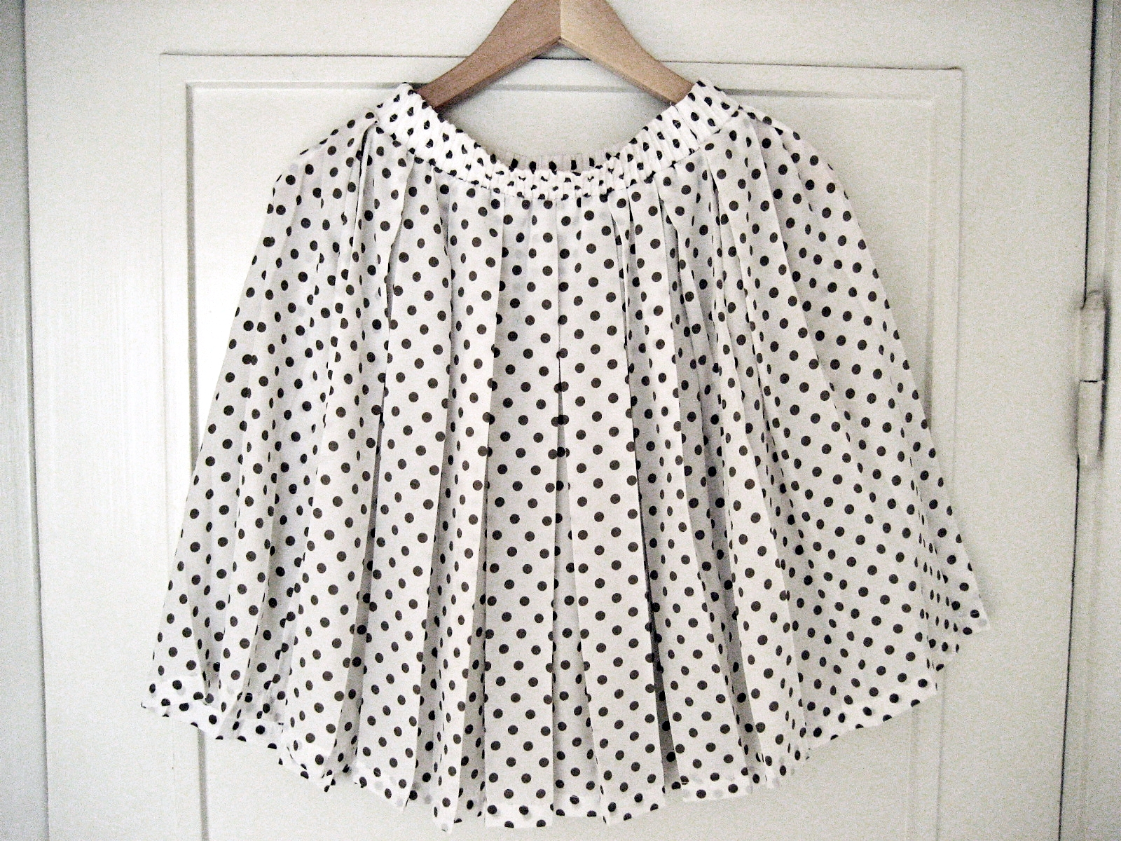 Image showing b/w polka dot skirt